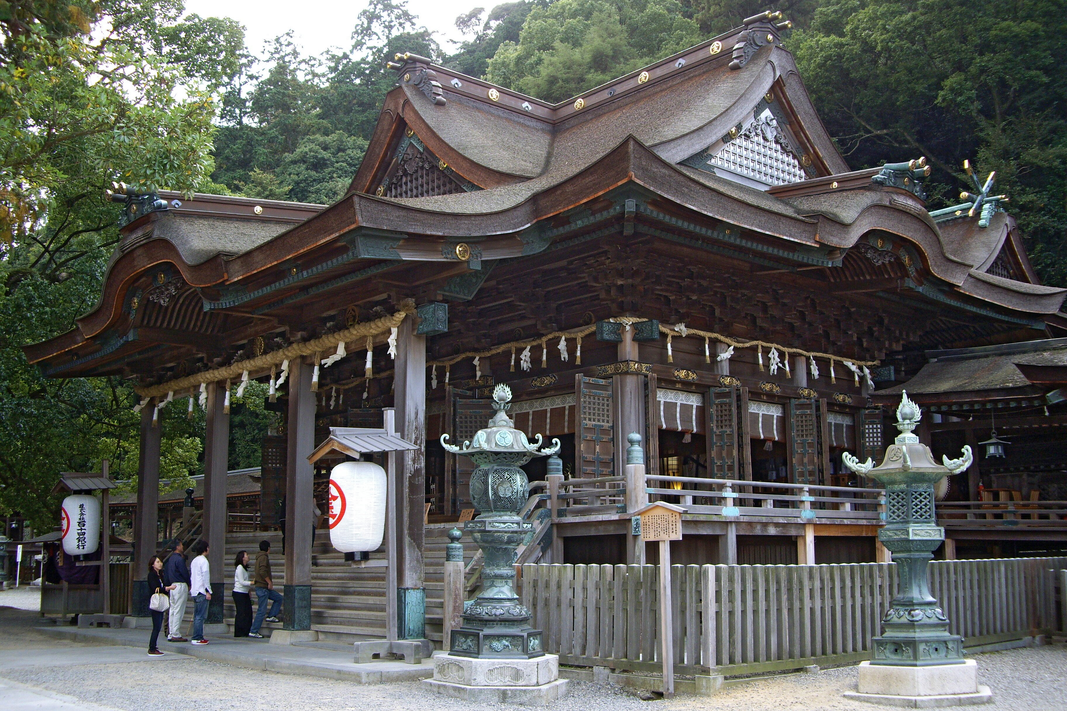 金刀比羅宮（本宮） - 日本国香川県琴平町